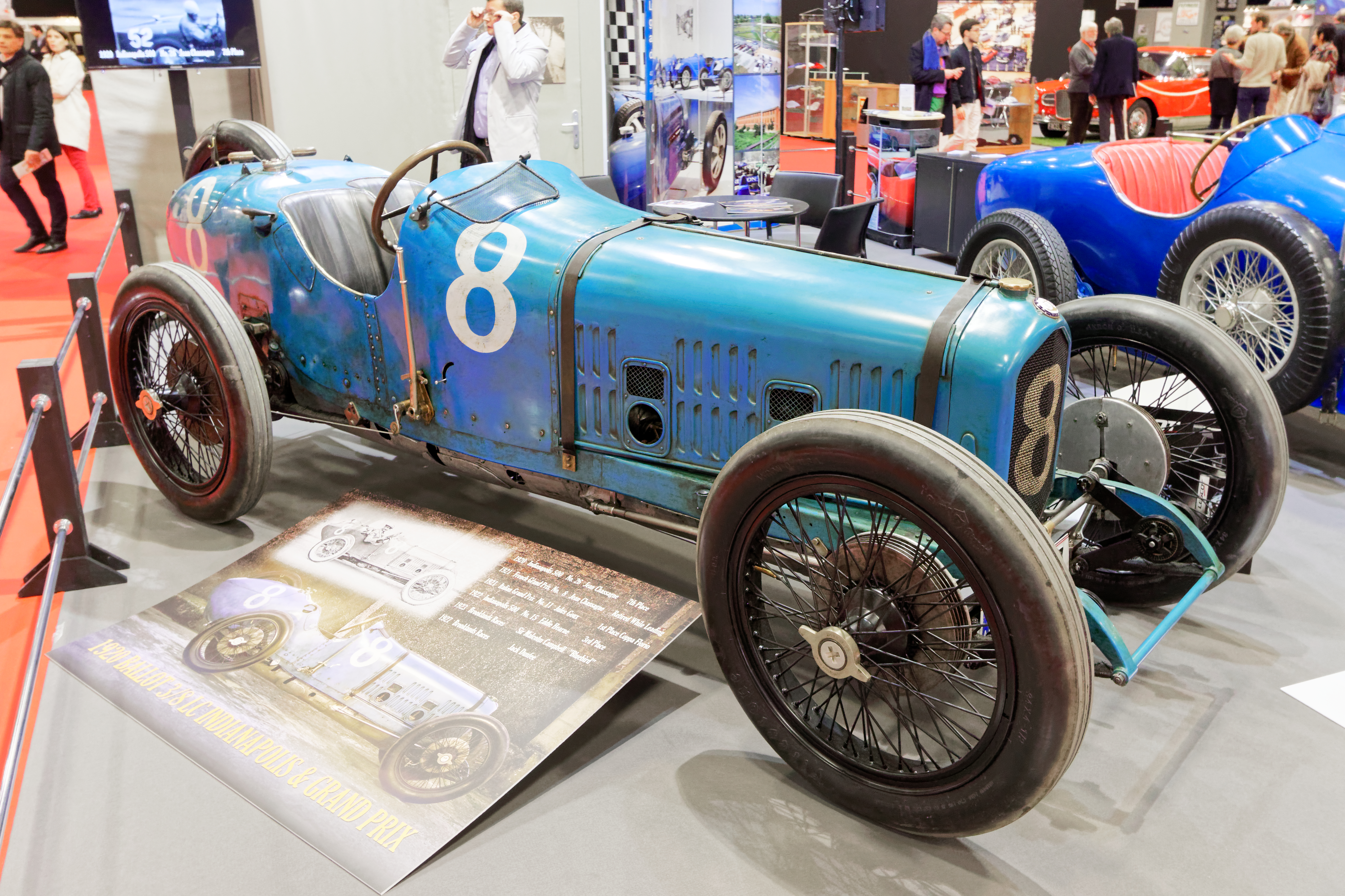 La Ballot châssis n°2 de 1920 exposée lors du salon Rétromobile 2017. Cette voiture était pilotée par Jean Chassagne que ce soit aux 500 miles d'Indianapolis 1920 ou au grand prix de France 1921